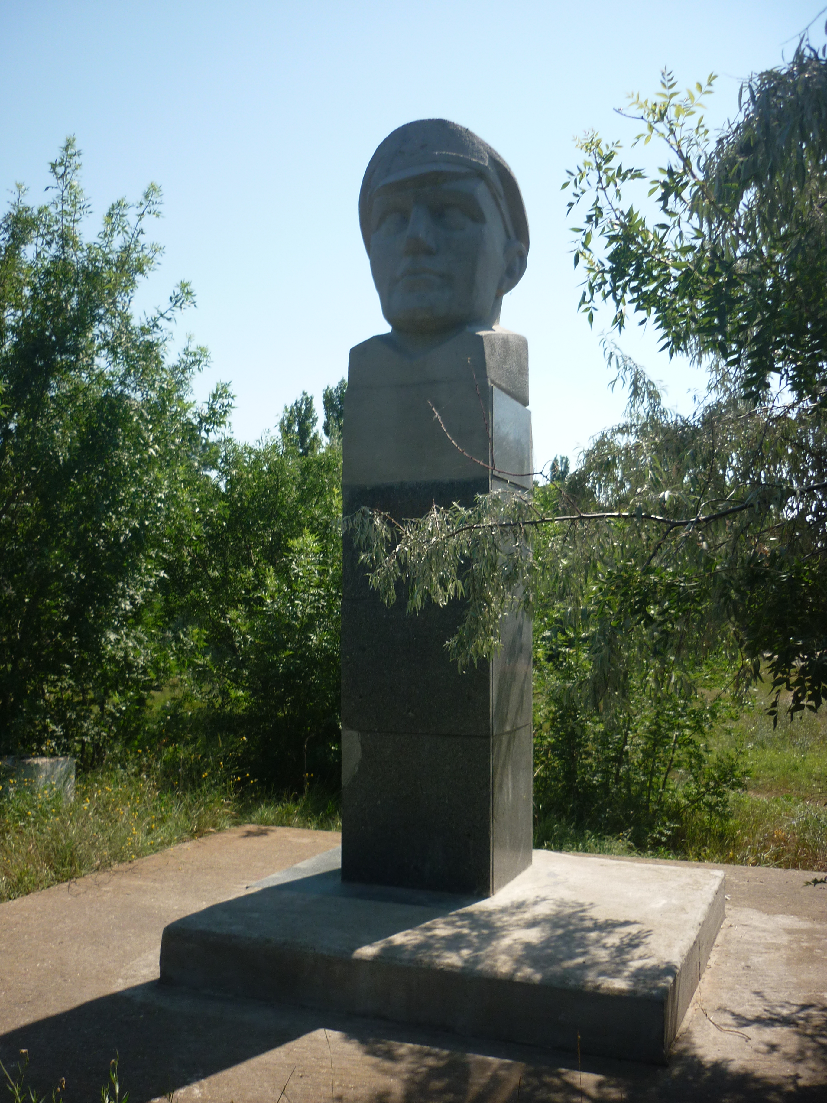 Памятник Лабренцису Фріцису Ансовичу в місті Саки АР Крим